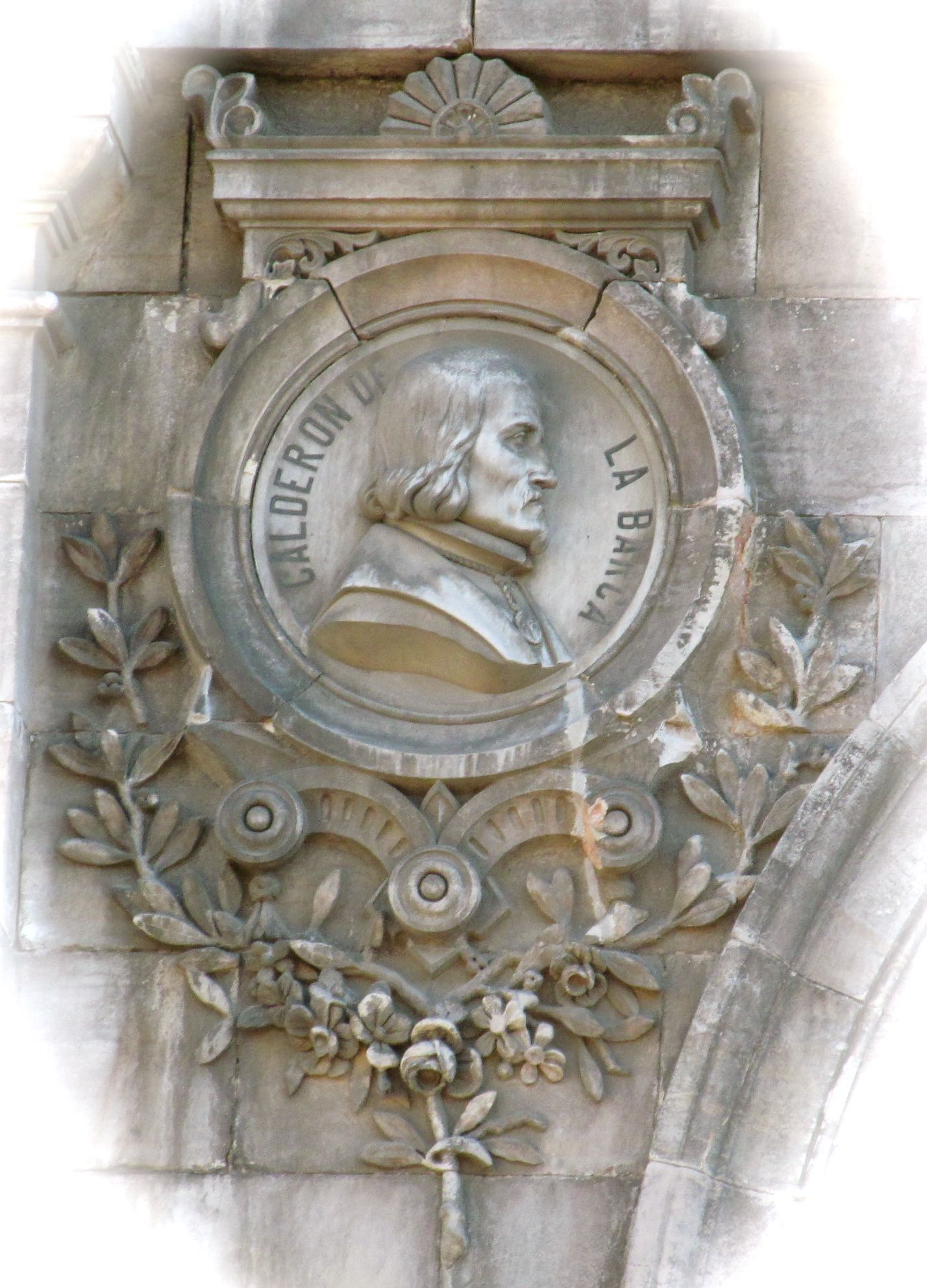 Medallón del escritor Pedro Calderón de la Barca y relieve de autor no identificado.